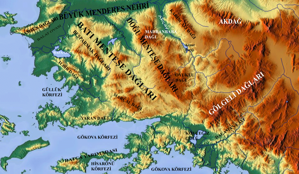 Türkiye, güney Ege Bölgesinde, Menteşe Dağları ve yakın çevresi